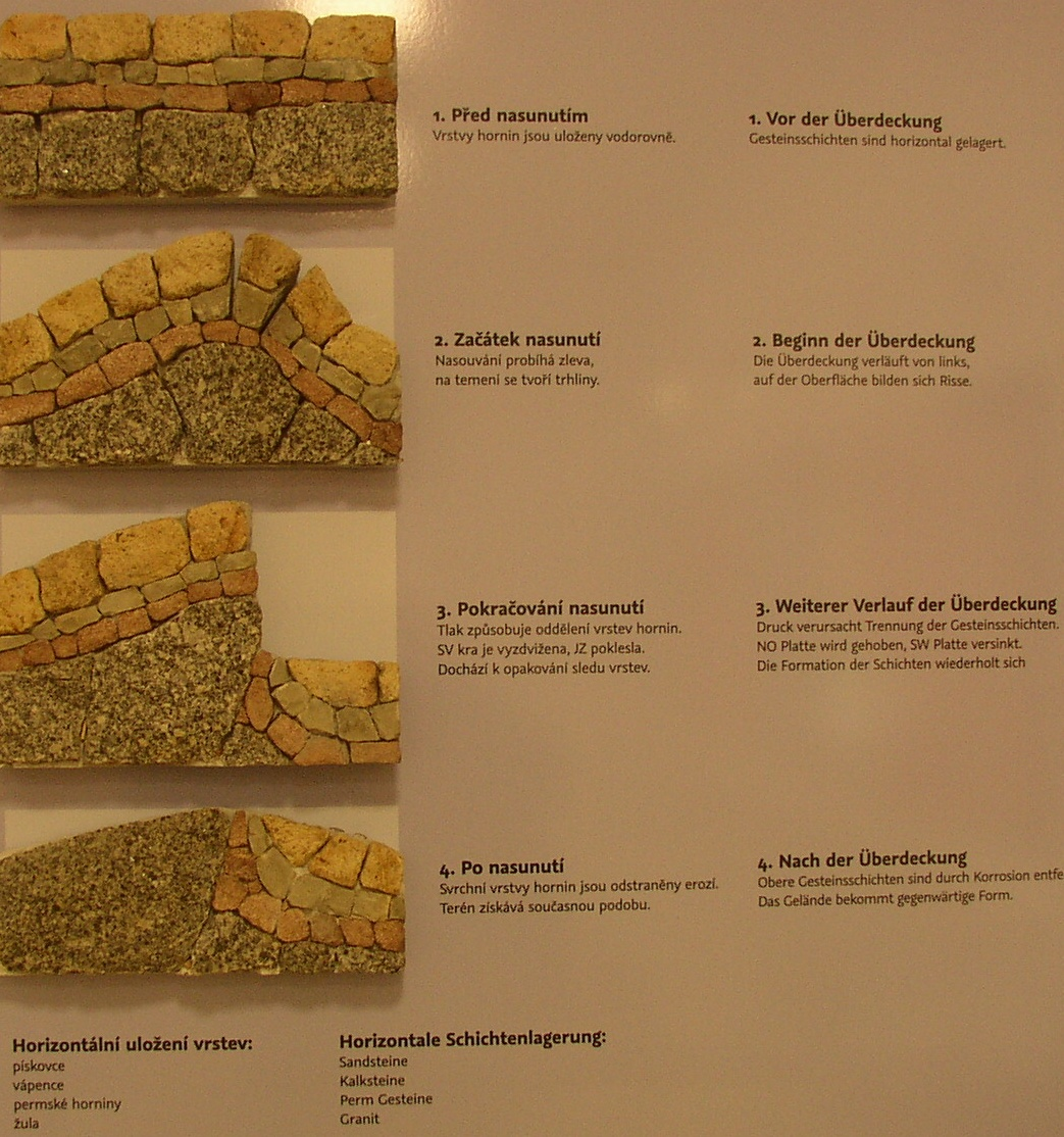 Vznik lužického přesmyku